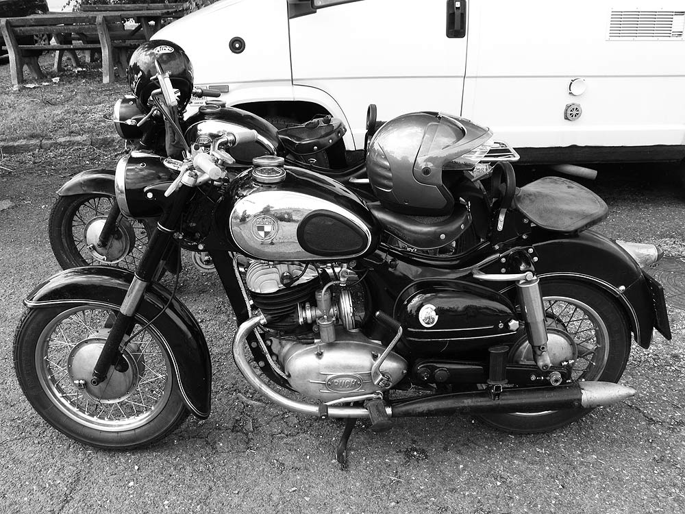 Zwei Puch 250 SG vor dem Johann Puch-Museum Graz: Typischer Schalenrahmen nach dem Patent von Musger und Oswald